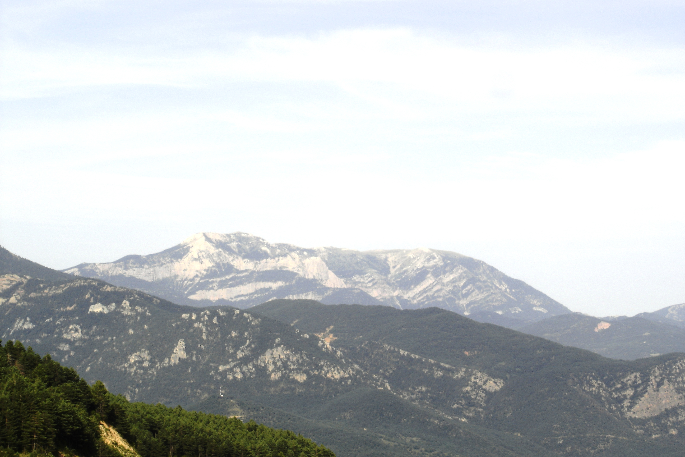 La Serra d'Ensija vista des de Coll de Jou, al vessant mereidional del massís del Port del Comte (Solsonès)